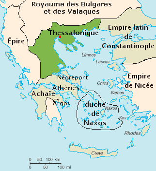 Carte du royaume de Thessalonique en 1204. Auteur : Cornelis